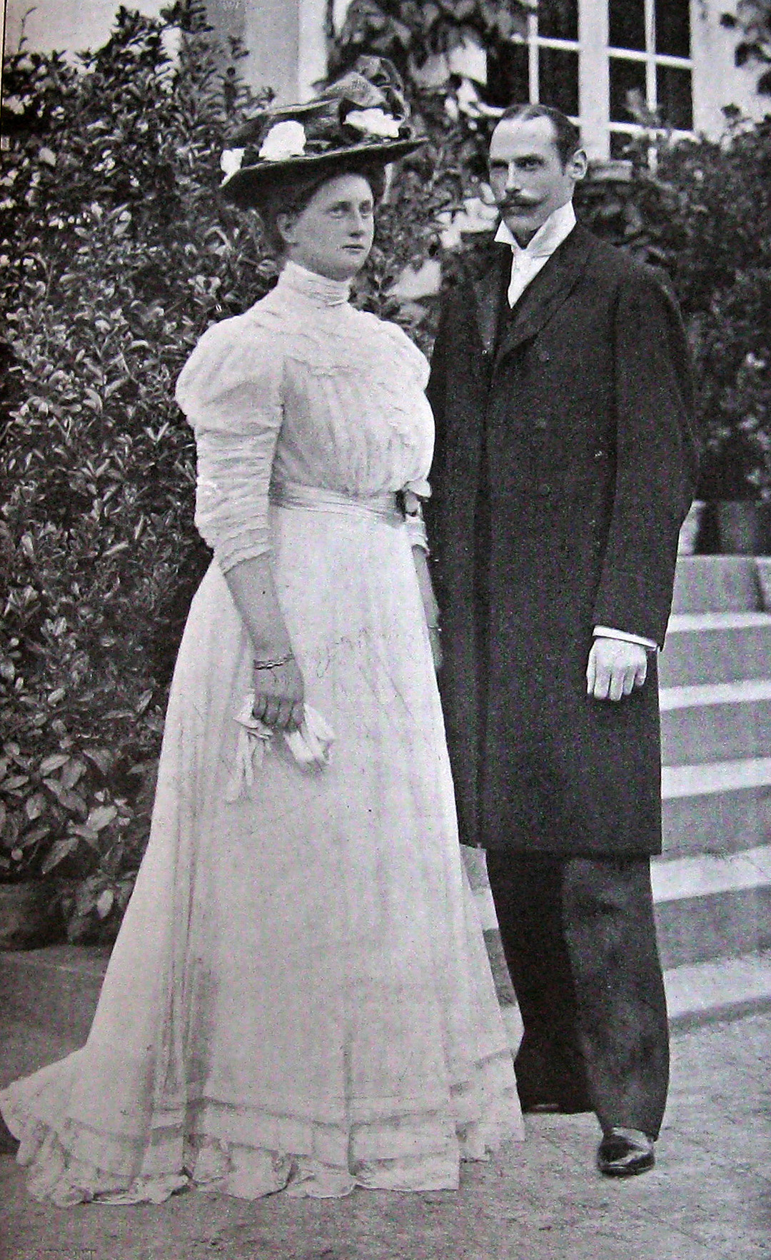 Prins Harald (8. oktober 1876 – 30. marts 1949), søn af Frederik 8. og dermed prins af Danmark.